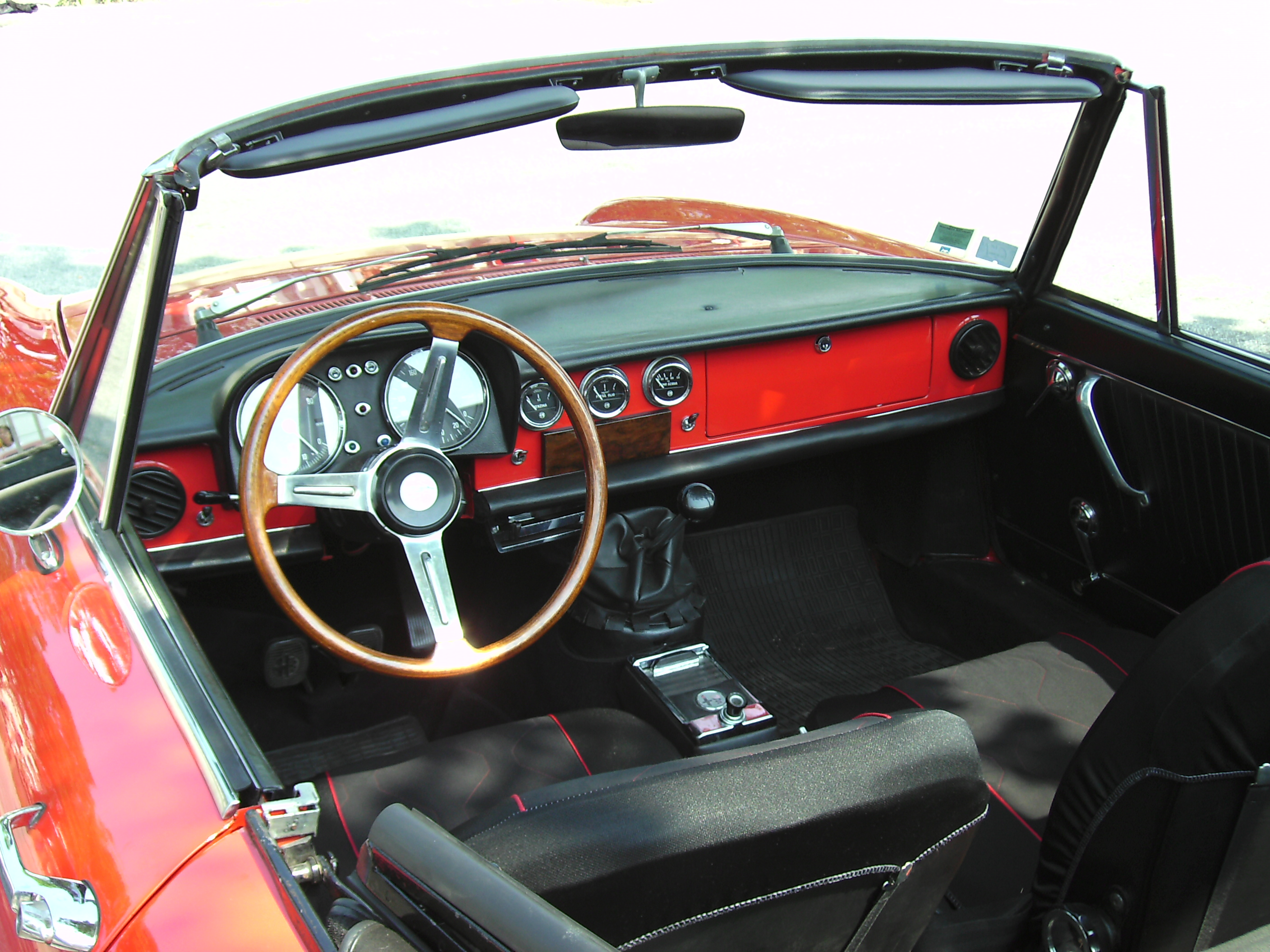 Alfa Romeo Duetto 1967, Cockpit